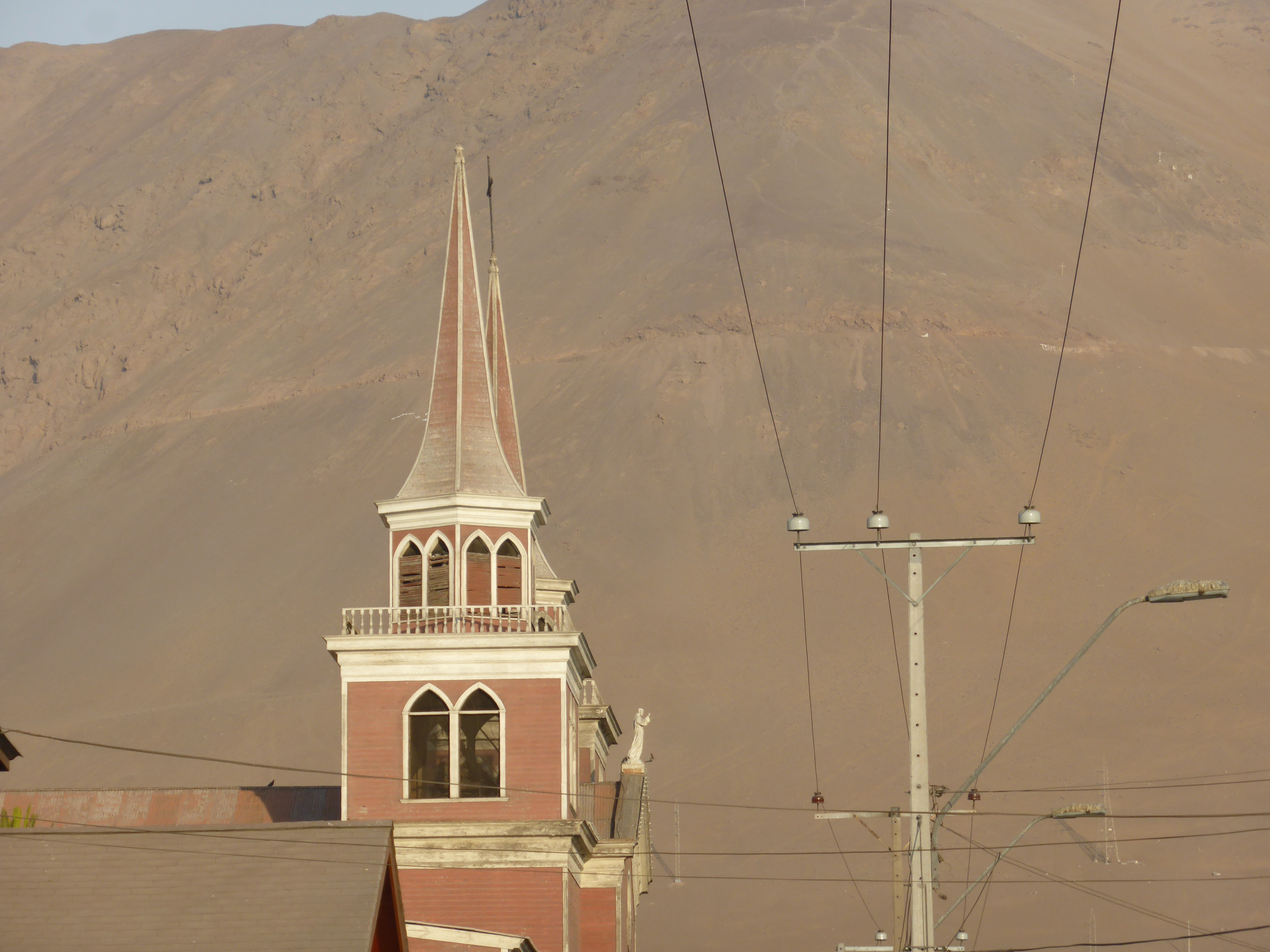 Iglesia construida en madera de pino Oregón. Declarada "Monumento Nacional" en la categoría de "Monumento Histórico". Parroquia de san Antonio de Padua y Convento Franciscano de Iquique. Calle Almirante Latorre 1364. Se construyó en los primeros años del siglo XX.